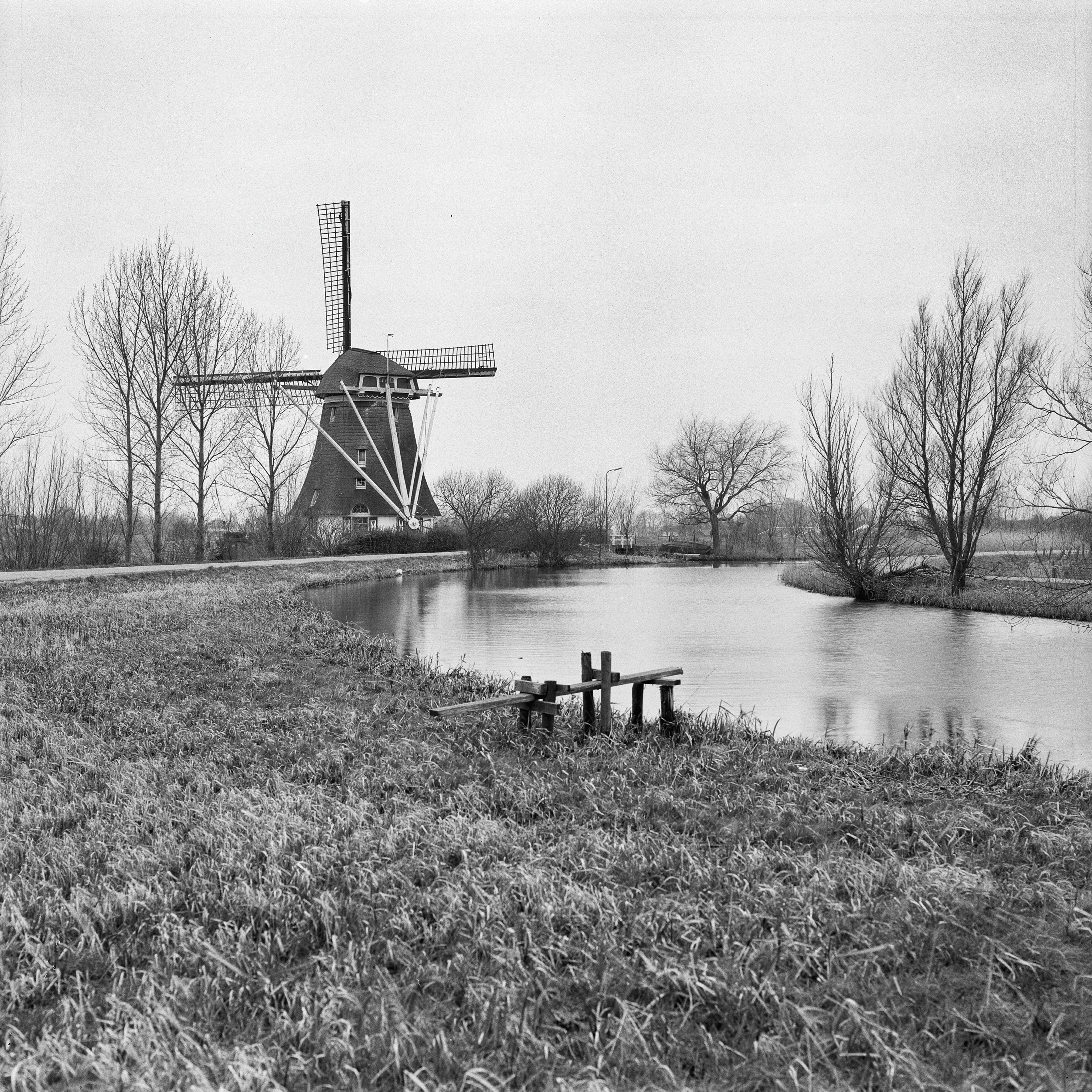 Molen Aan De Gein: Exterieur OVERZICHT